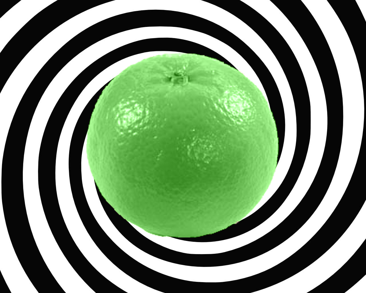 Cuadro "Green Orange", de Amanda Sullivan